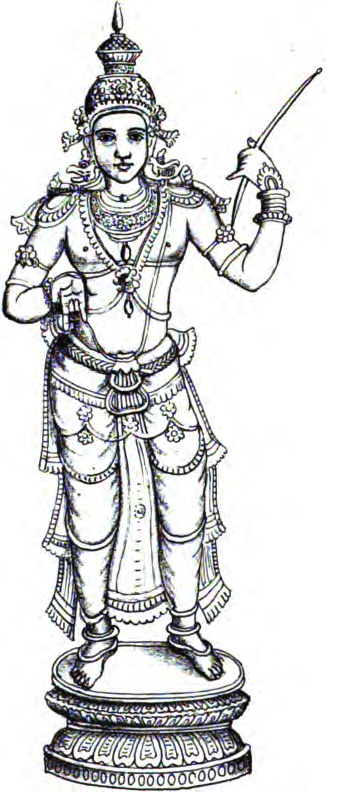 Cheraman Perumal